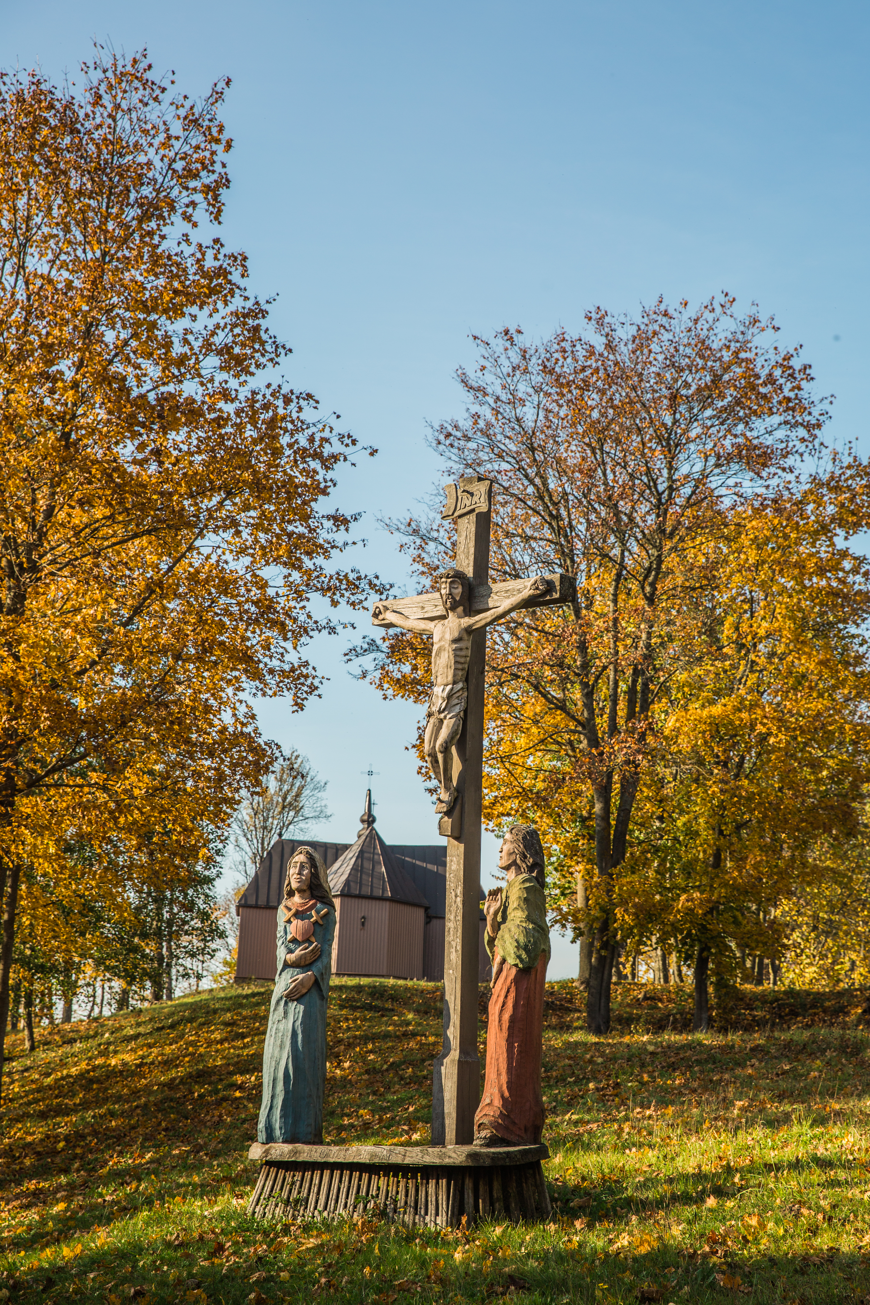 Žemaičių Kalvarijos kryžiaus kelias